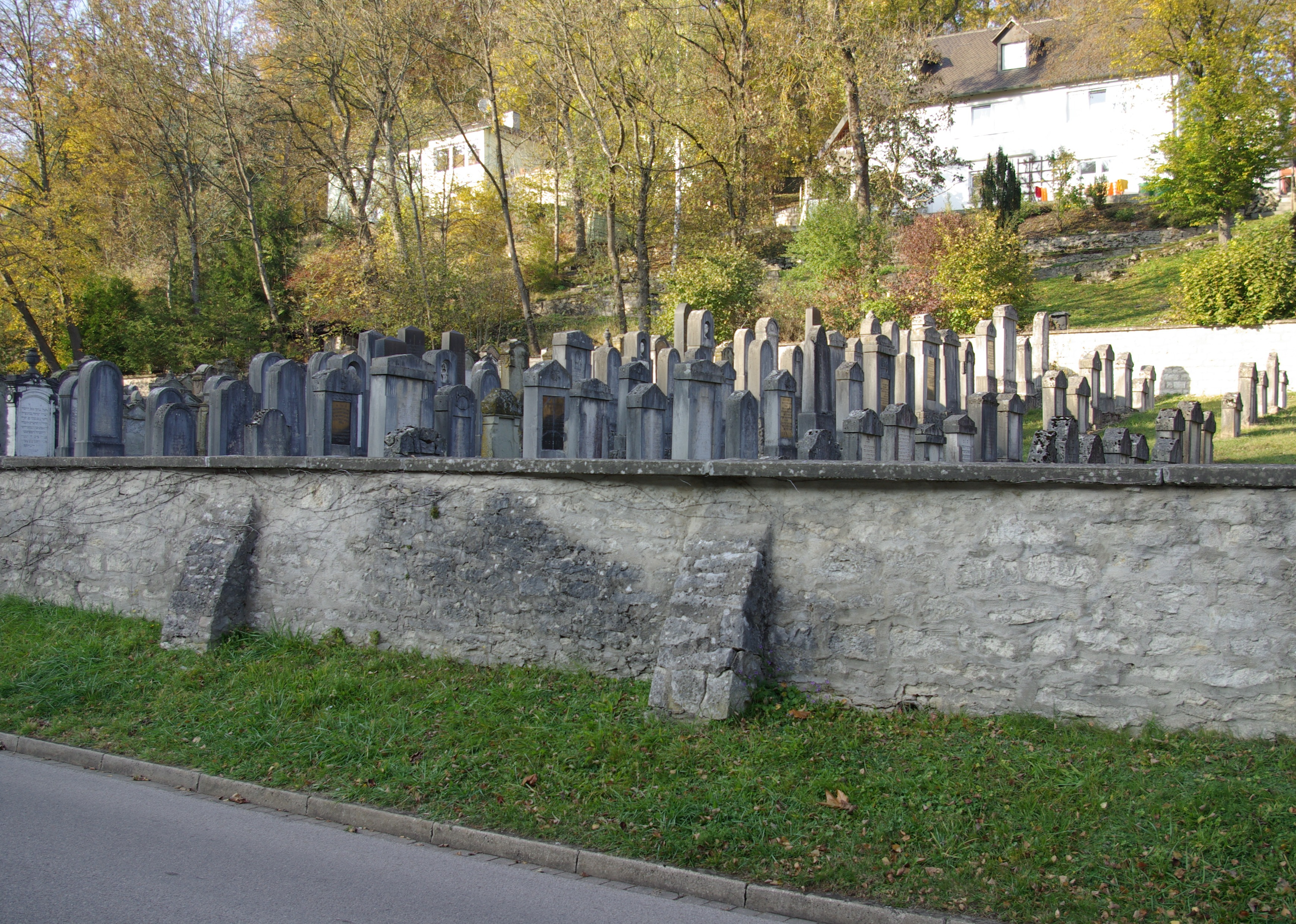 Jüdischer Friedhof in Treuchtlingen